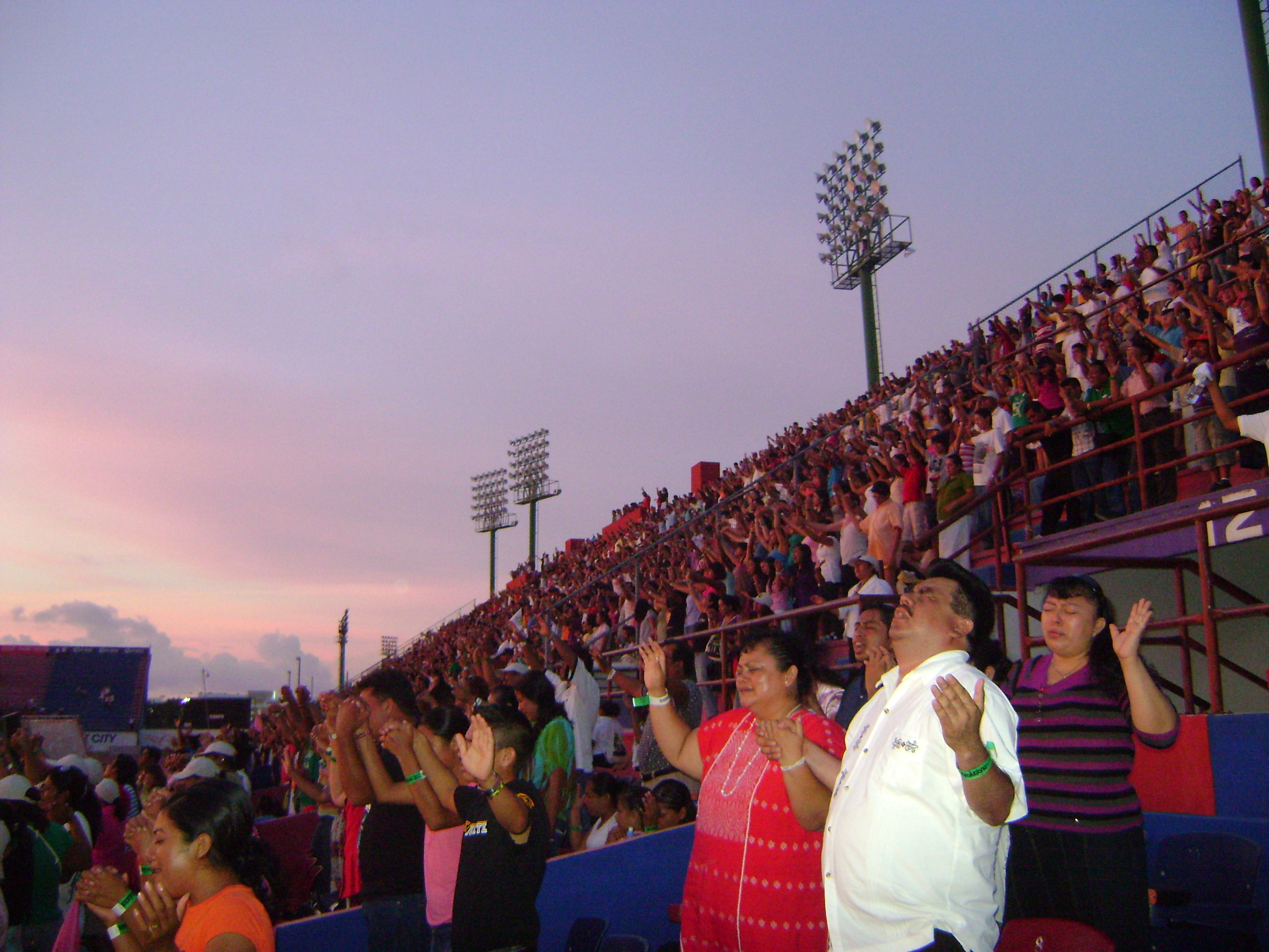 Congreso Nacional Juvenil de las Asambleas de Dios efectuado el 14 de Julio de 2010 en Cancún, Q. Roo, México.